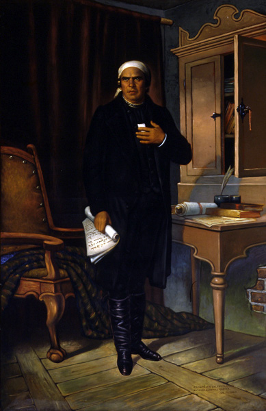 José María Morelos, óleo de Petronilo Monroy, MNH/INAH.